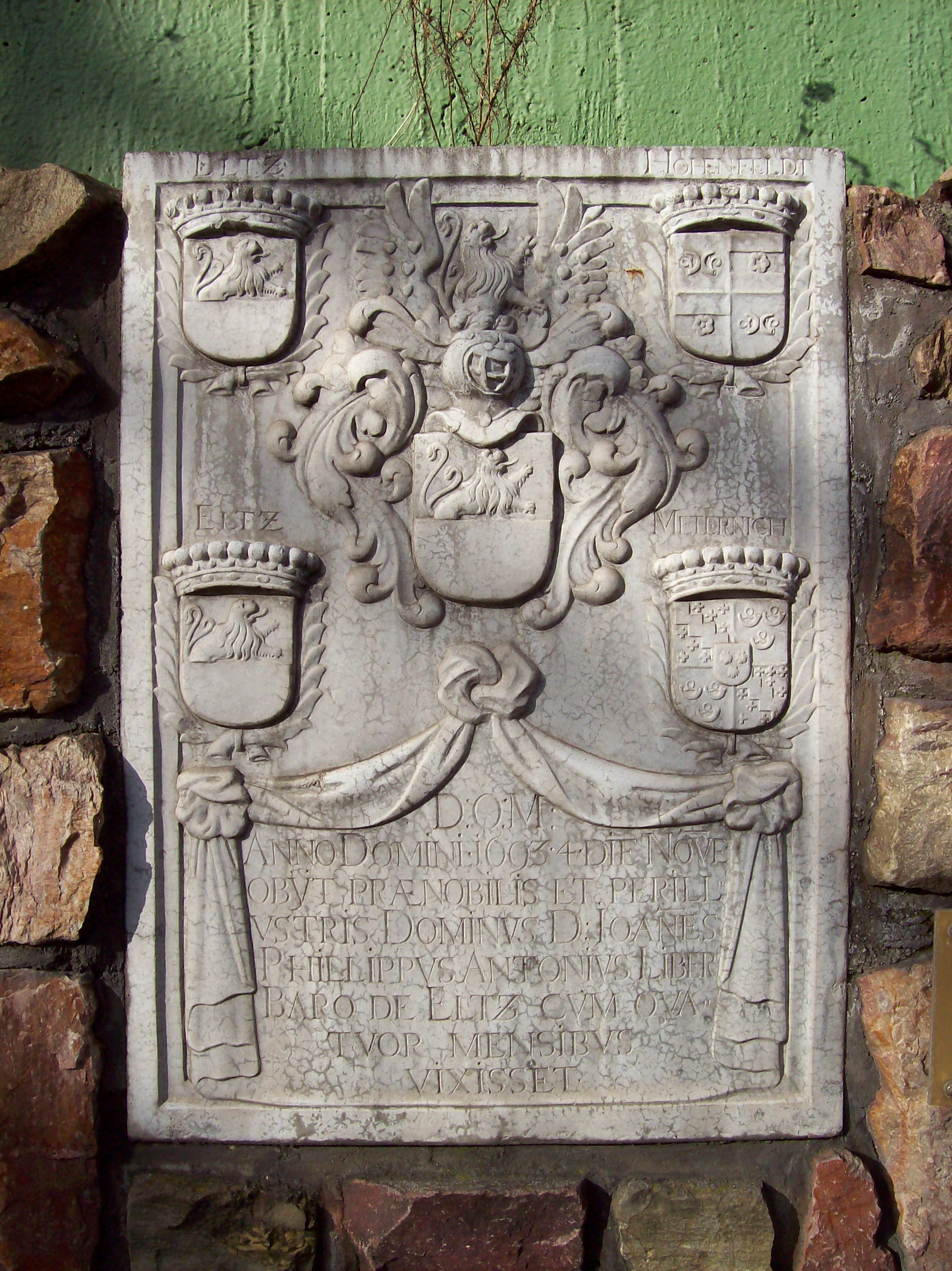 Eine Kopie des Grabmals des Johann Philipp Anton von Eltz; Diese Kopie befindet sich in der Straße Am Alten Posthof in Boppard. Das Original befindet sich in der Bopparder Karmeliterkirche. Der echte Grabstein ist aus dem Jahr 1693.